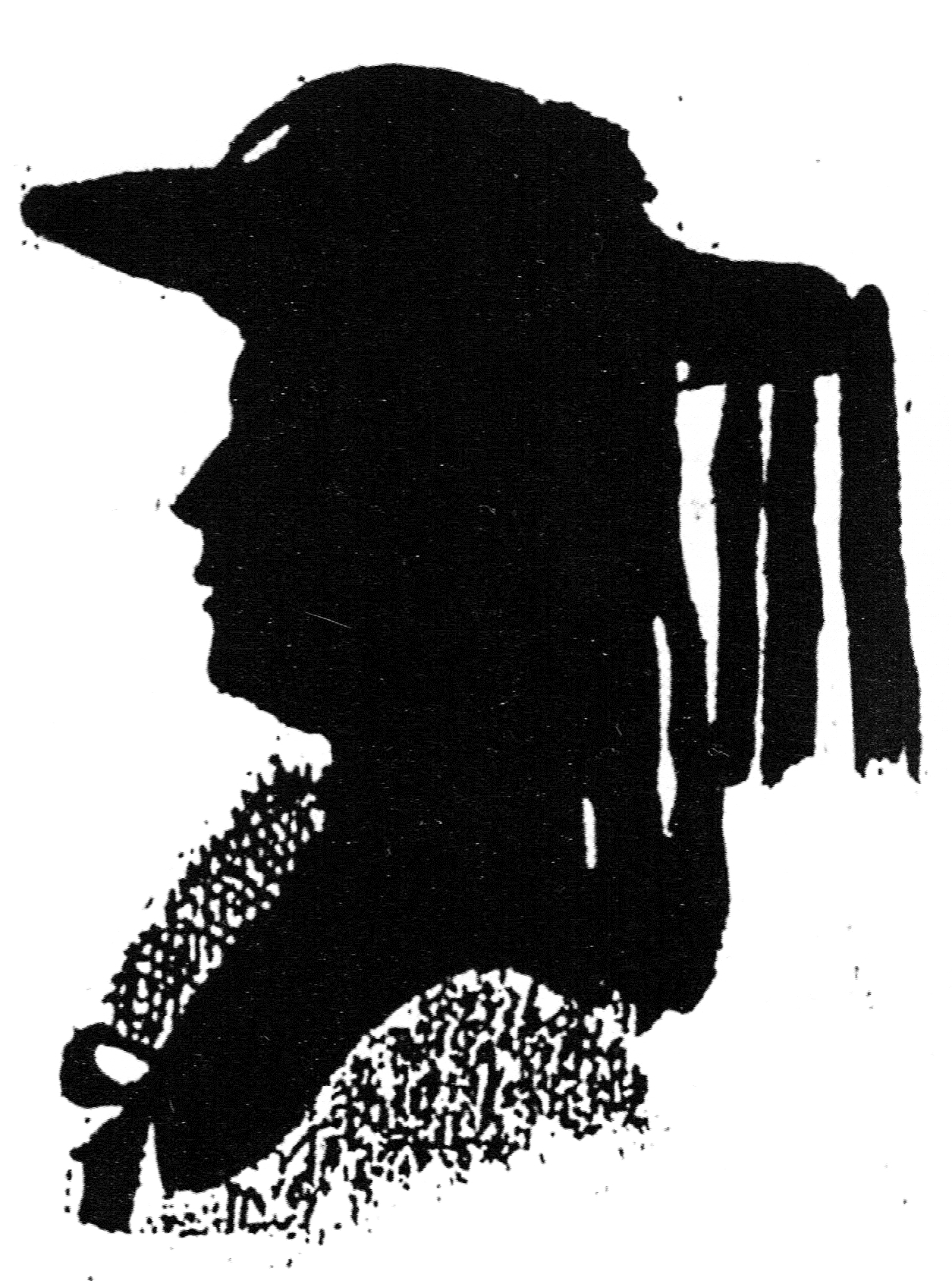 Madame Forster = Therese geb. Heyne